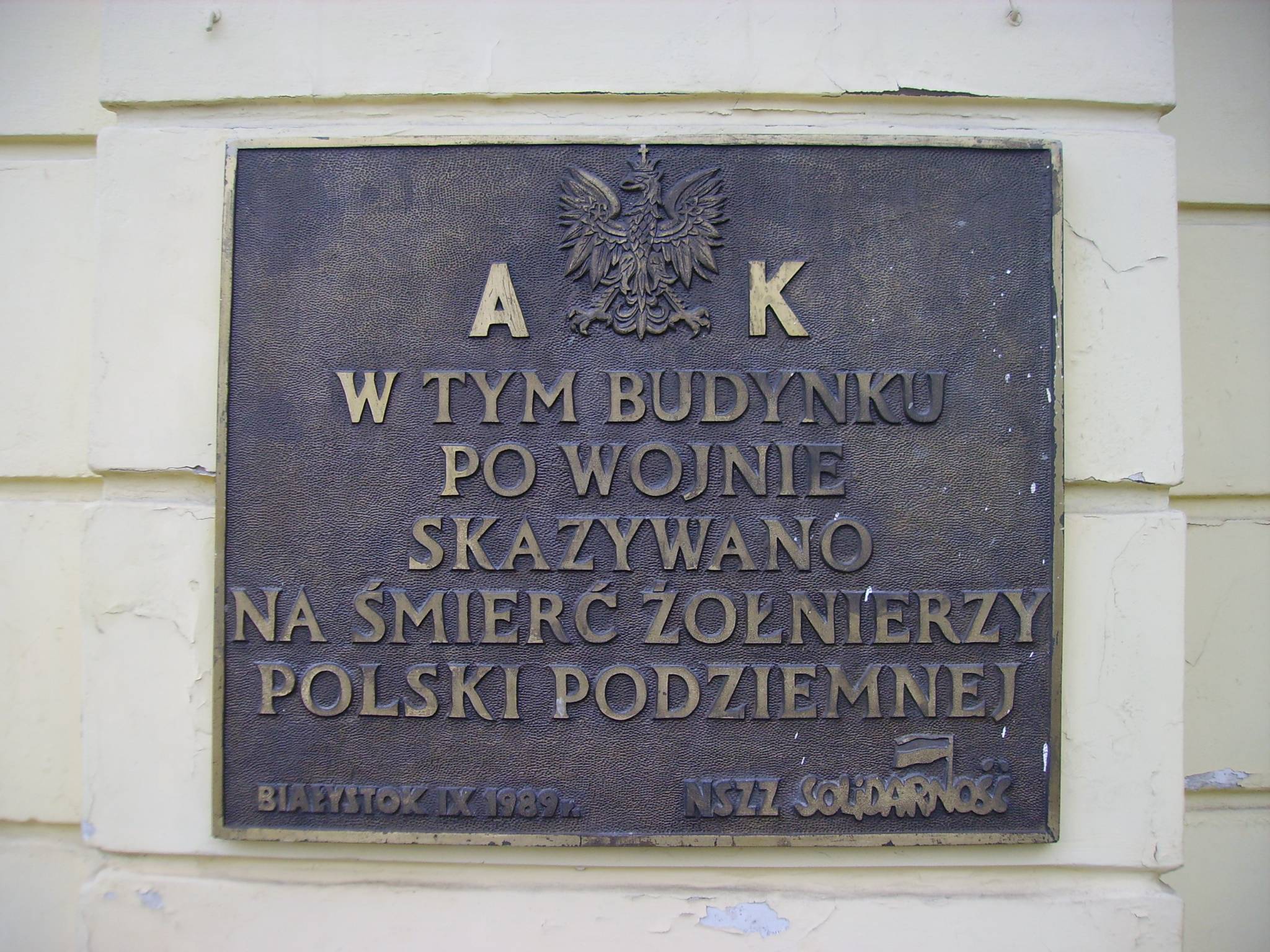 Kino Ton w Białymstoku (Rynek Kościuszki 2). Tablica upamiętniająca miejsce skazań żołnierzy Polski Podziemnej.